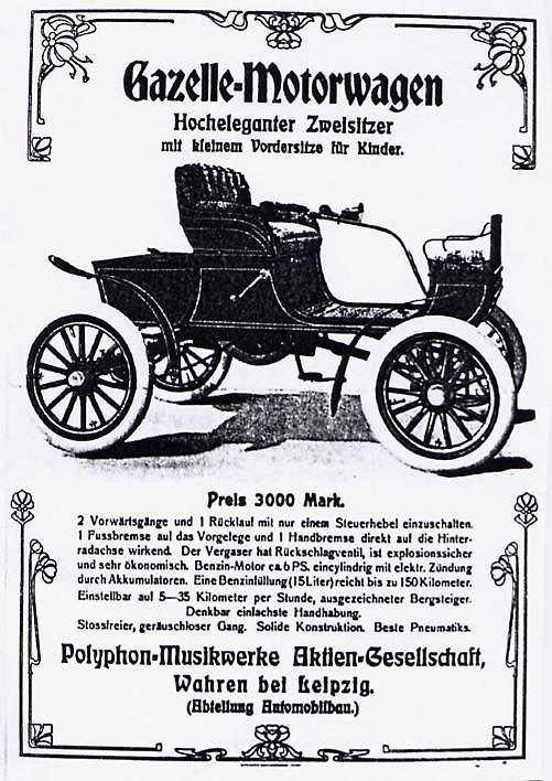 Beschreibung: Anzeige aus einer Zeitung aus dem Jahr 1904